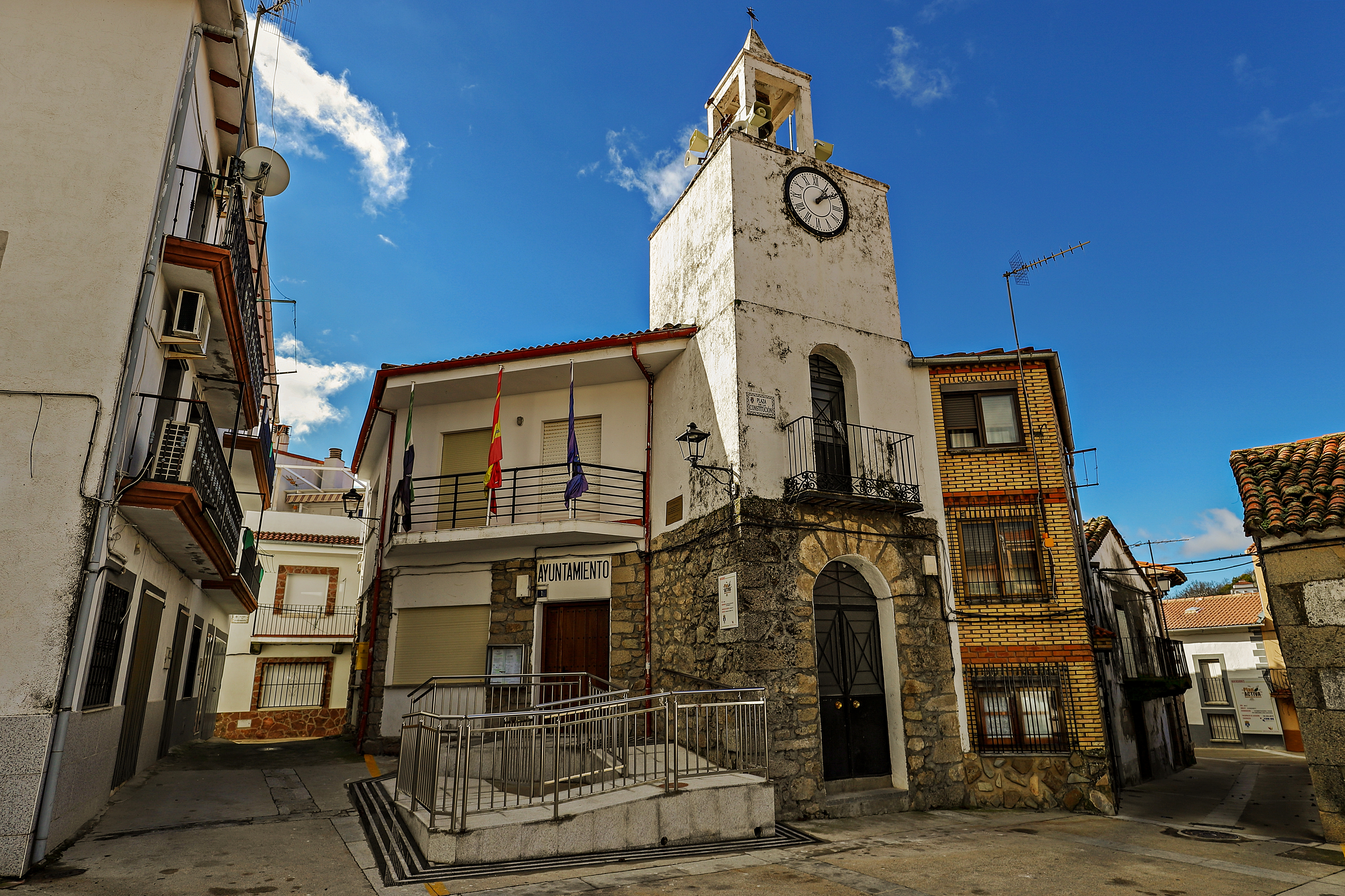 Cabezabellosa es un municipio de la comarca de Trasierra en la provincia de Cáceres.